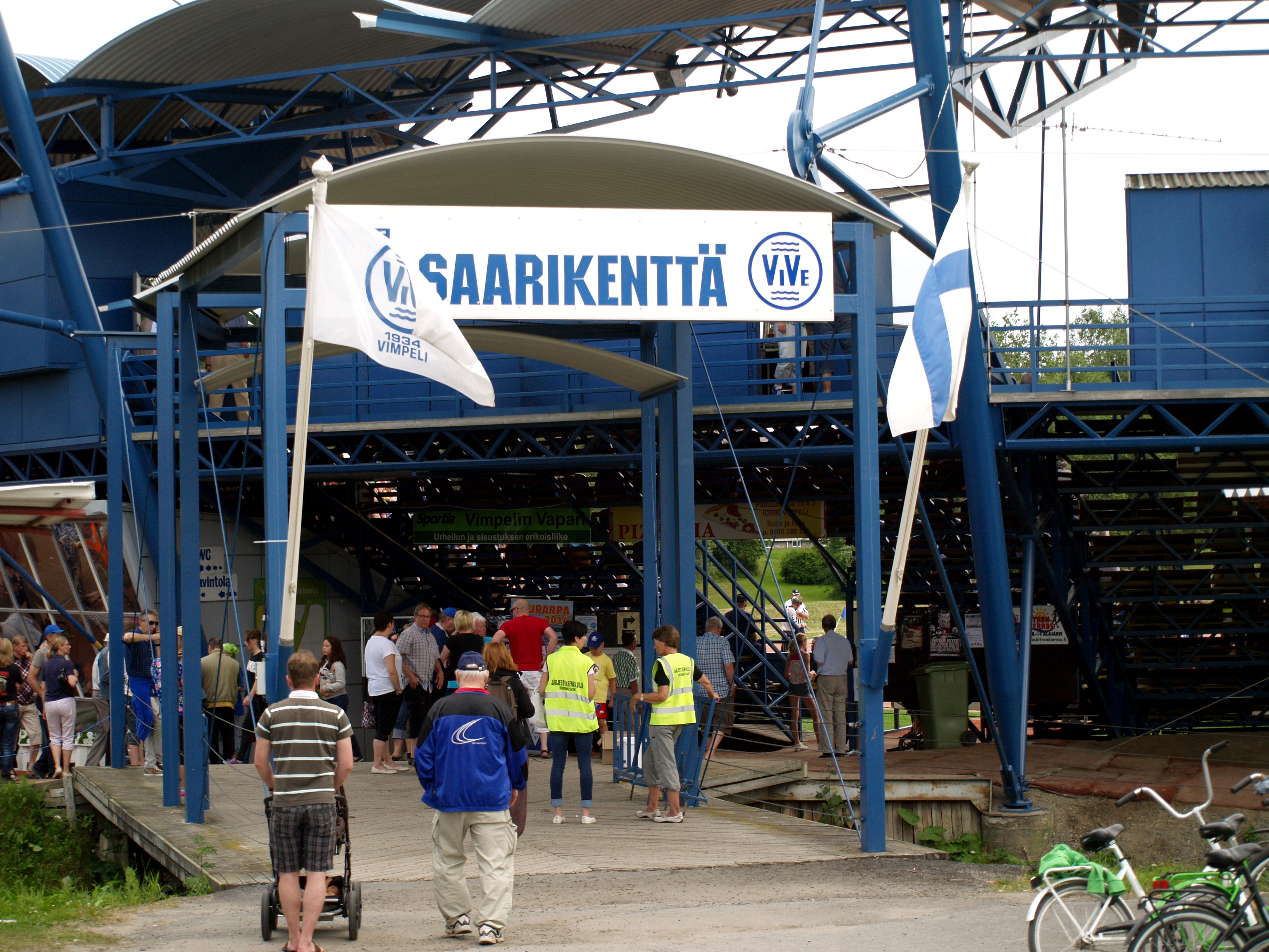 Saarikentän portti Vimpelin Veto - JymyJussit pesäpallo-ottelussa 13.7.2014.